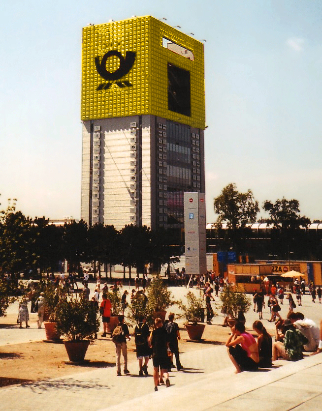 Expo2000-Briefkasten-Turm der Deutschen Post AG aufgenommen am: 21. Juni 2000 auf der Expo 2000 in Hannover